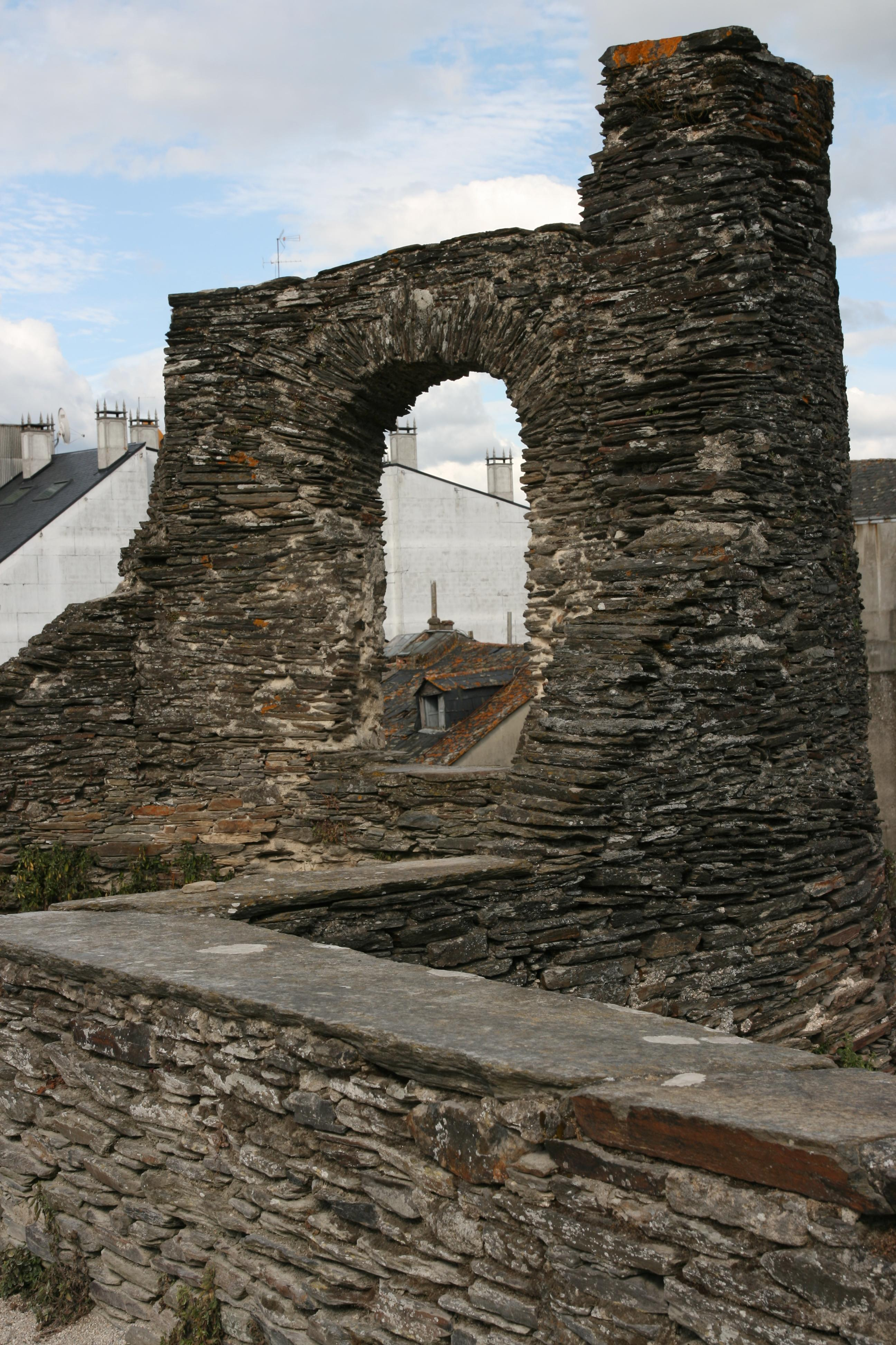 Muralla de Lugo